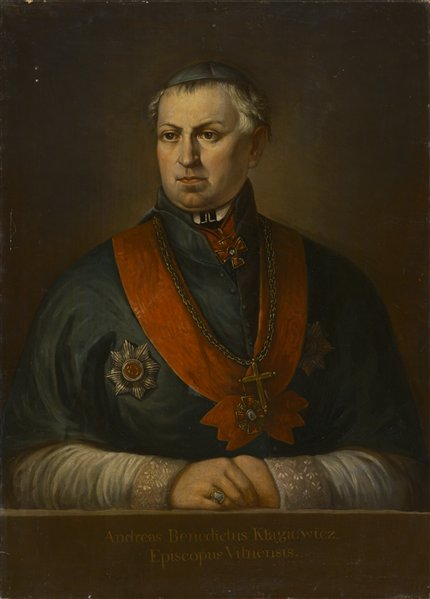 Беларуская (тарашкевіца): Партрэт Андрэя Бэнэдыкта Клангевіча (Andrej Benedykt Kłanhievič) (1767—1841), рымска-каталіцкага дзеяча, біскупа-суфрагана берасьцейскага, біскупа віленскага, доктара тэалёгіі.